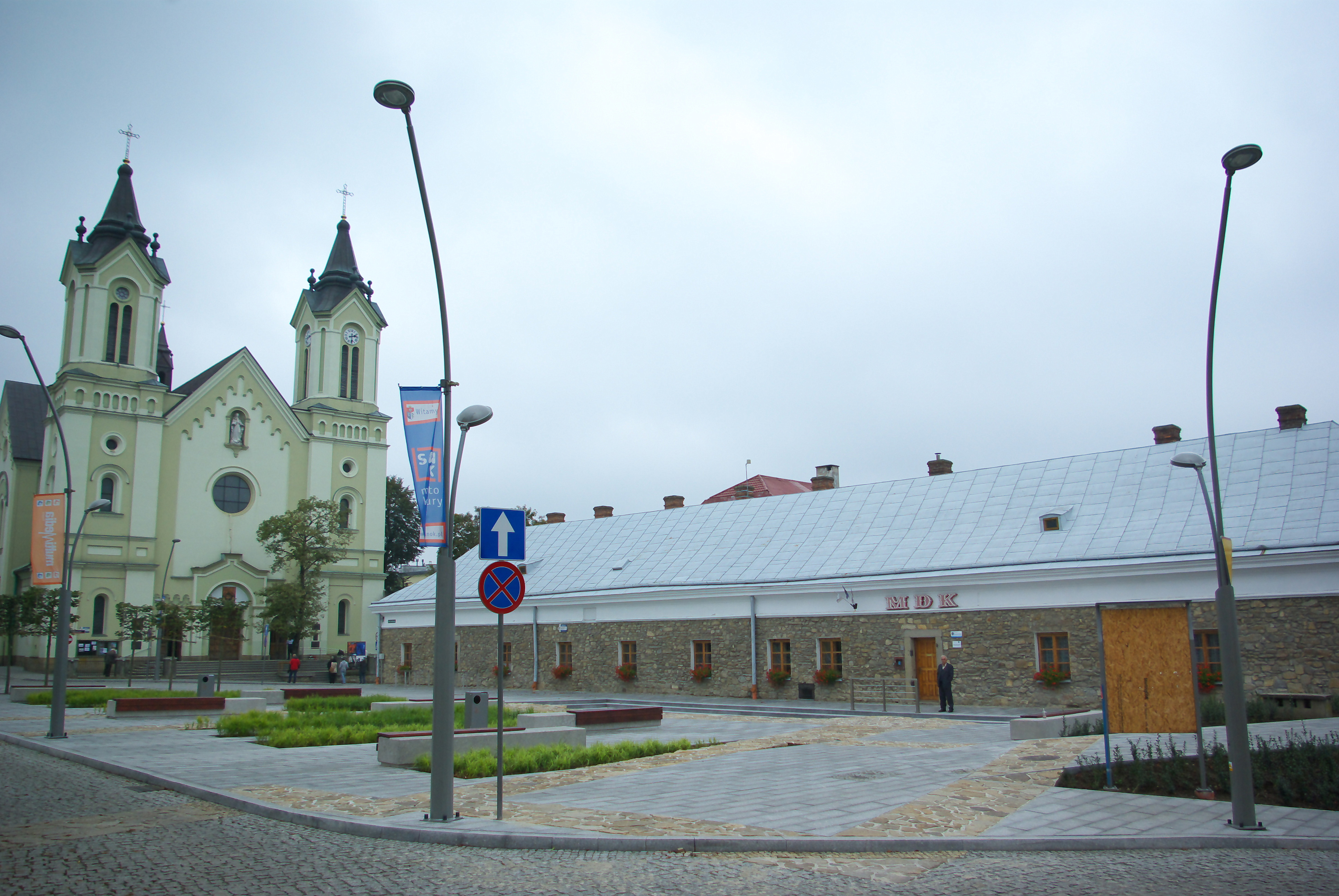 Plac Świętego Michała w Sanoku.